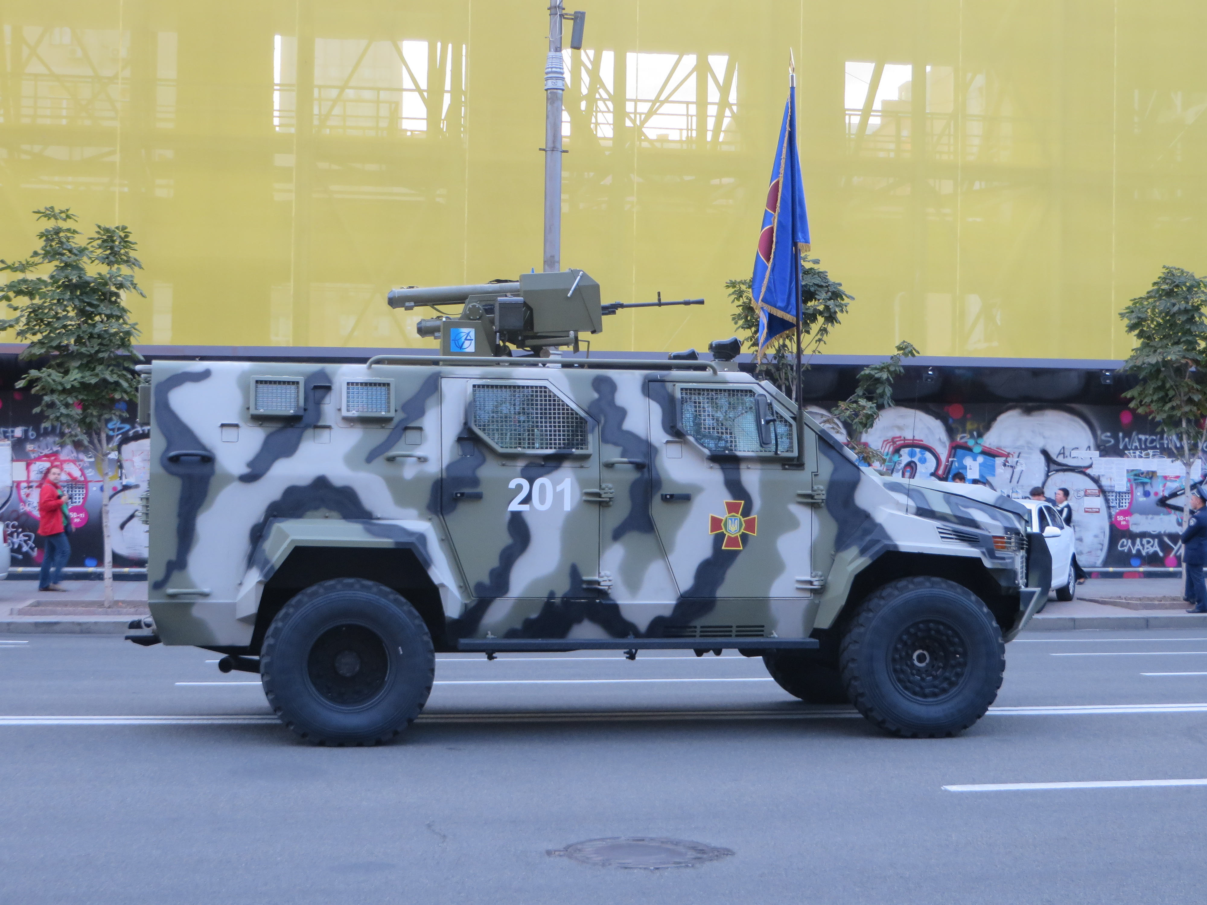 Українські броньовики KRAZ Spartan під час тренувального маршу перед парадом на День незалежності, 22 серпня 2014 року, Київ, Україна.